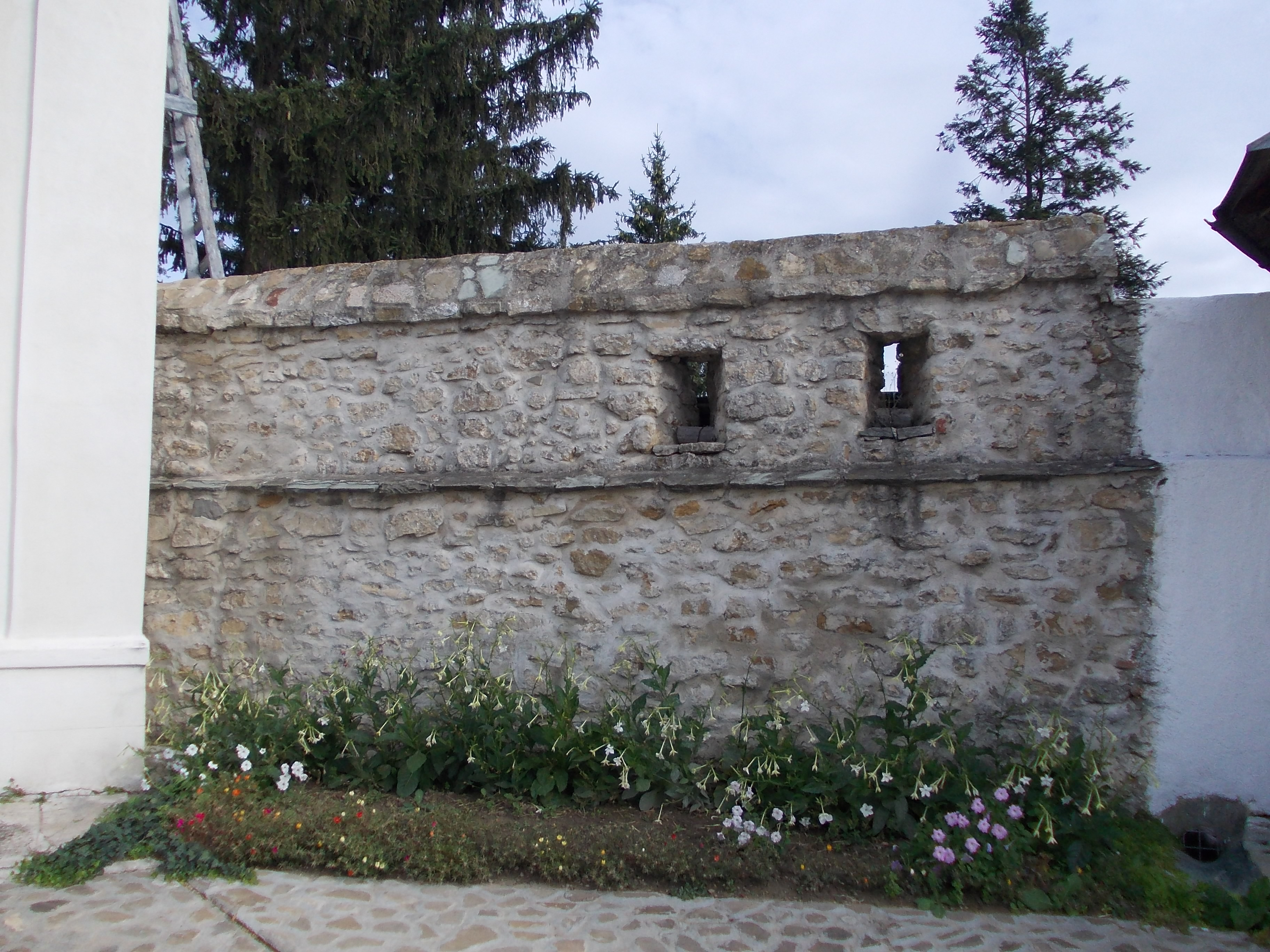 Zid de incintă, episcopia Romanului 05